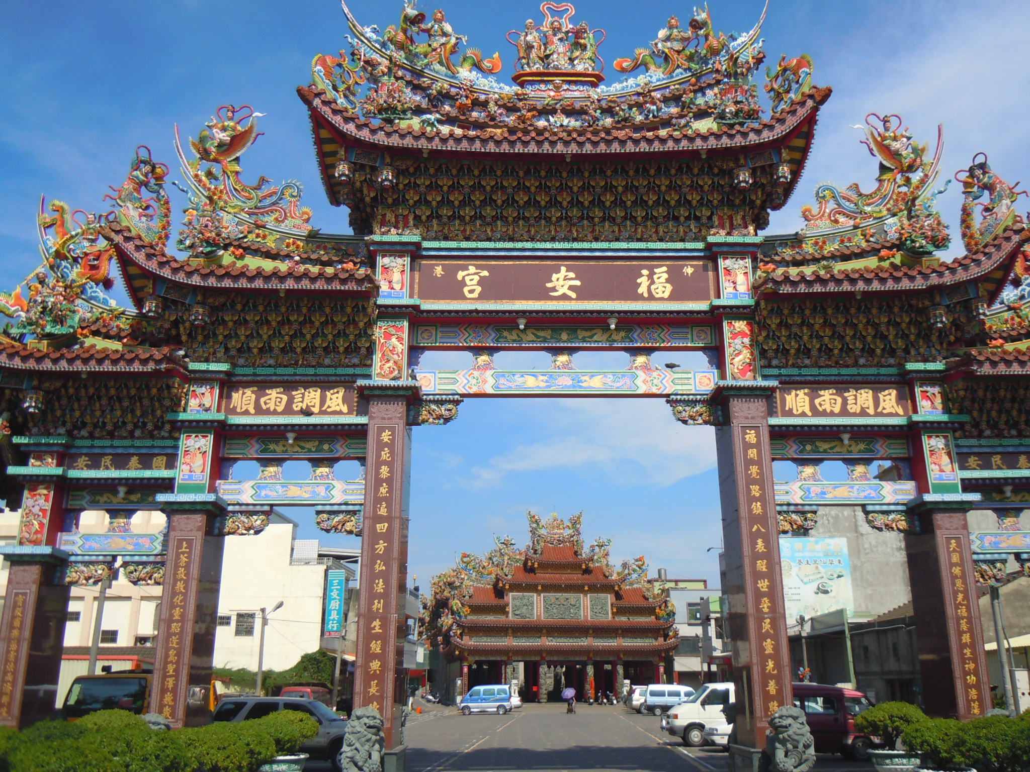 伸港福安宮位在彰化縣伸港鄉大同村福安路五號。